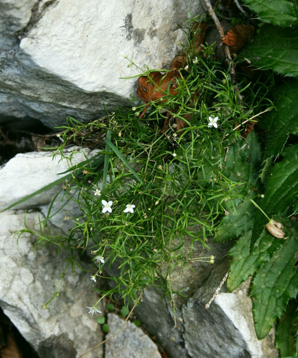 Moos-Nabelmiere (Moehringia muscosa), Nelkengewächse (Caryophyllaceae) – Österreich/Austria/Autriche: Steiermark, Grazer Bergland, Weizklamm 6–7 km NNW Weiz